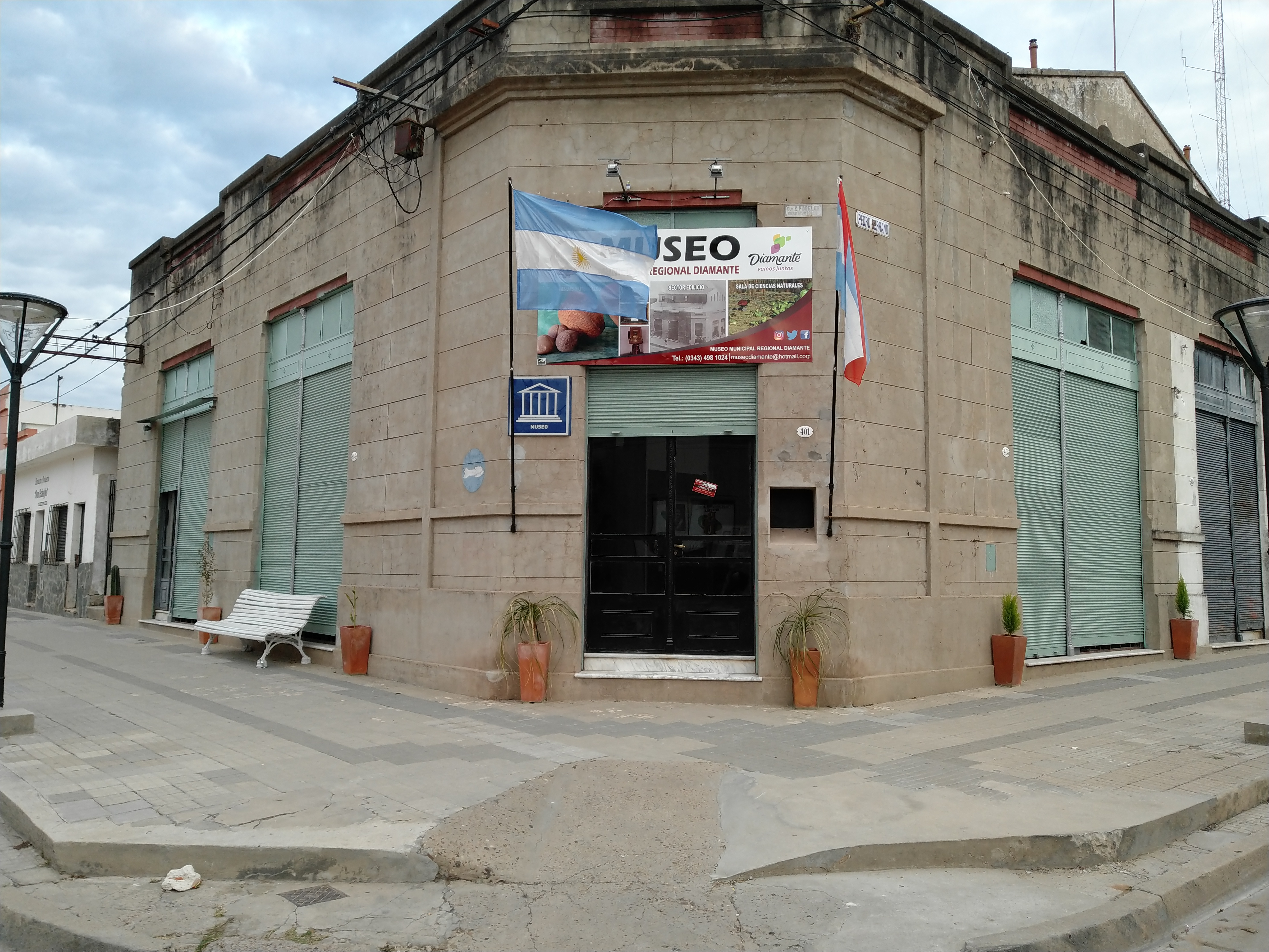 Desde 1994 funciona para visitantes locales y turistas